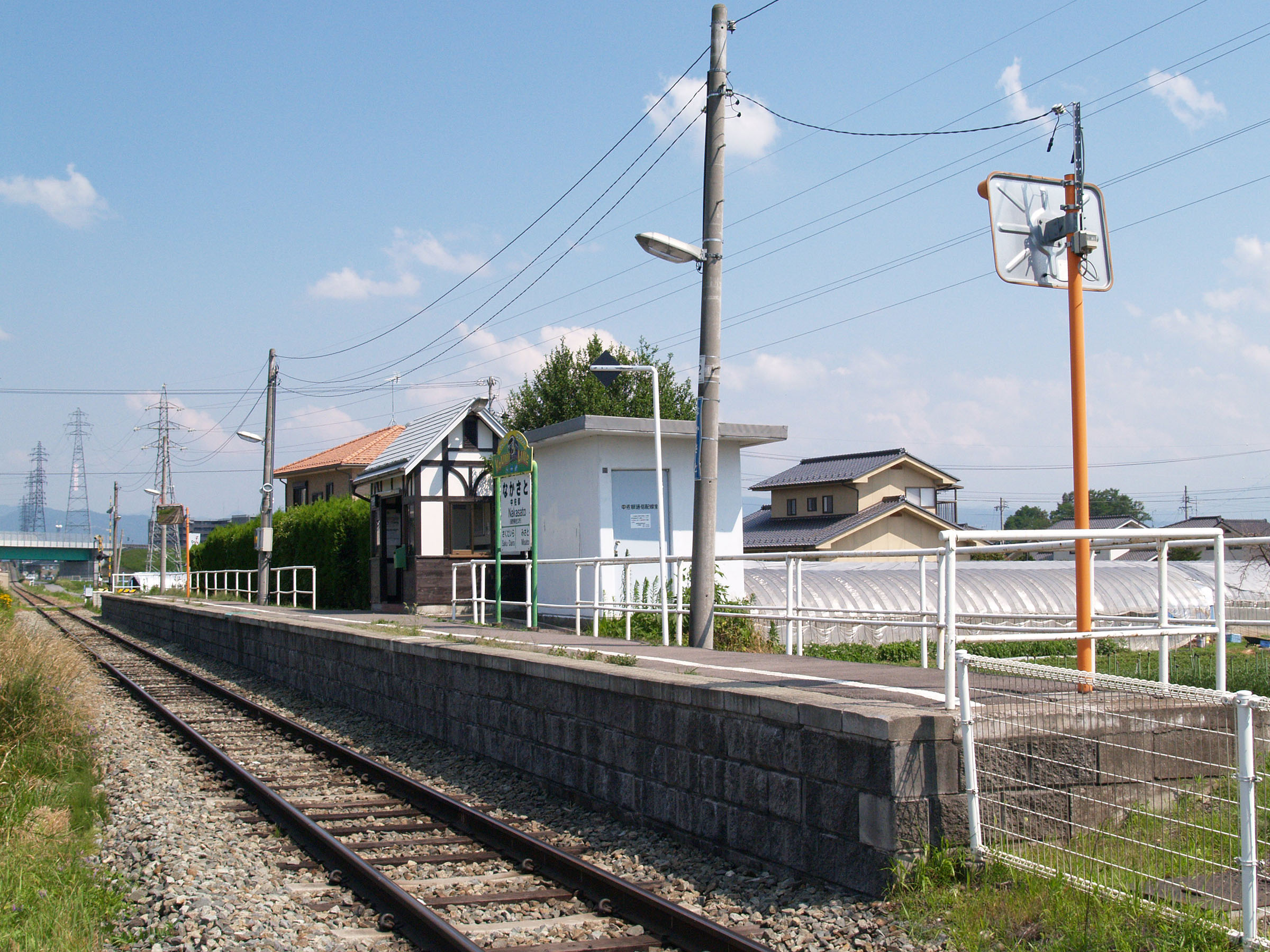 中佐都駅